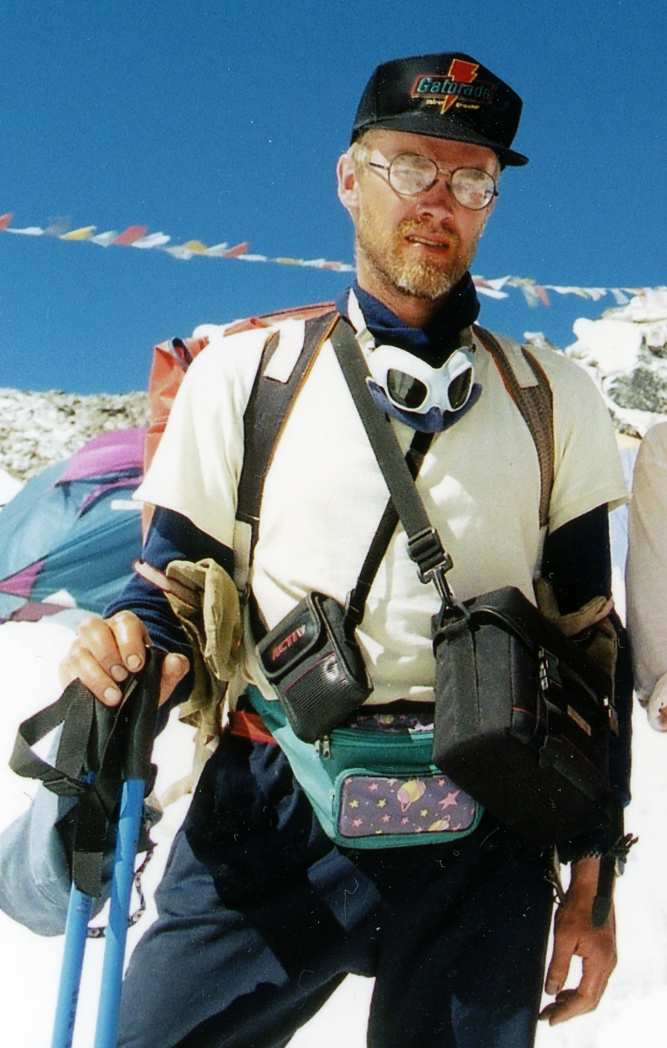 Raivo Plumer